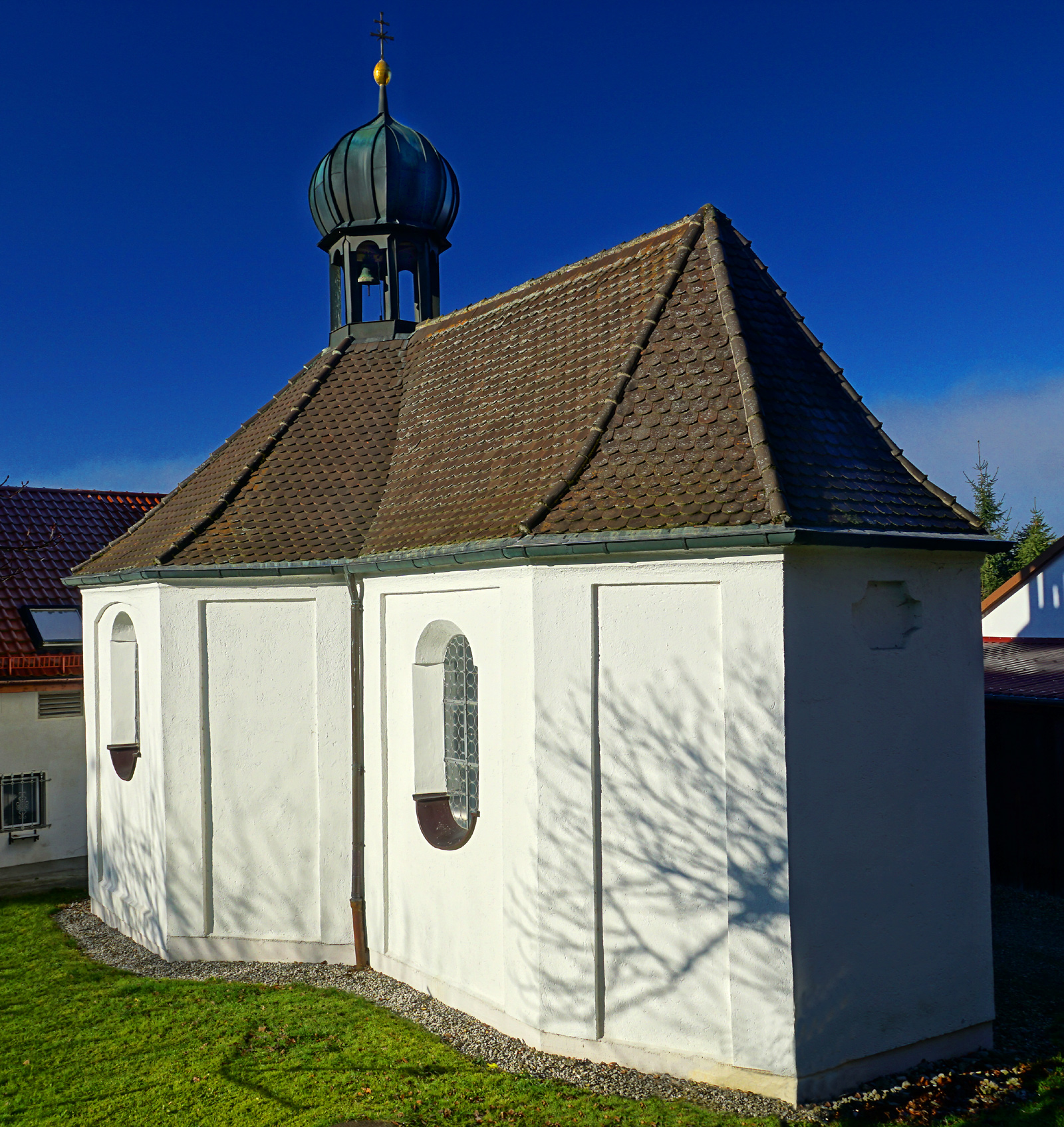 Walkertshofen Kapelle